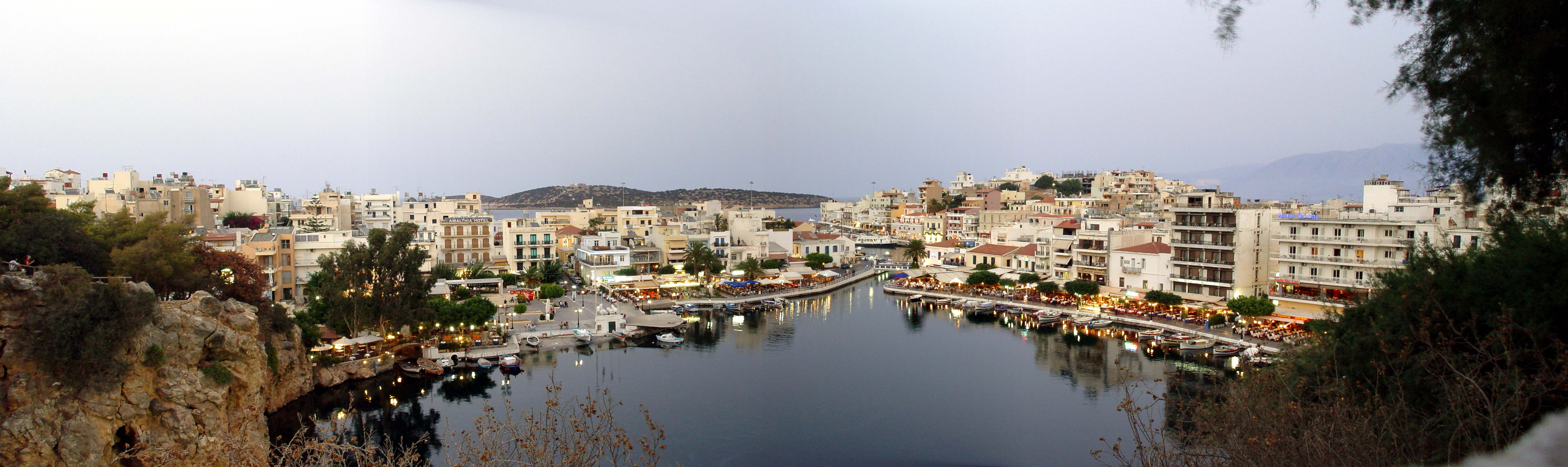 Der Voulisméni-See in Agios Nikólaos auf Kreta zur blauen Stunde. Im Hintergrund sieht man den Hafen. Das Bild wurde mit PTGui aus drei Einzelbildern gesticht und mit Photoshop Elements 2.0 nachbearbeitet. Es gibt noch eine größere Version dieses Bildes unter: Image:Voulismeni-See Nachts.JPG.